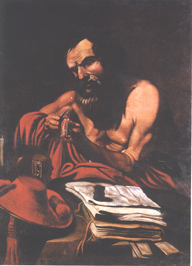 Pertany a la sèrie dels doctors de l'església llatina, situada actualment a la parroquia de Sant Miquel de Fuentes d'Ebro.